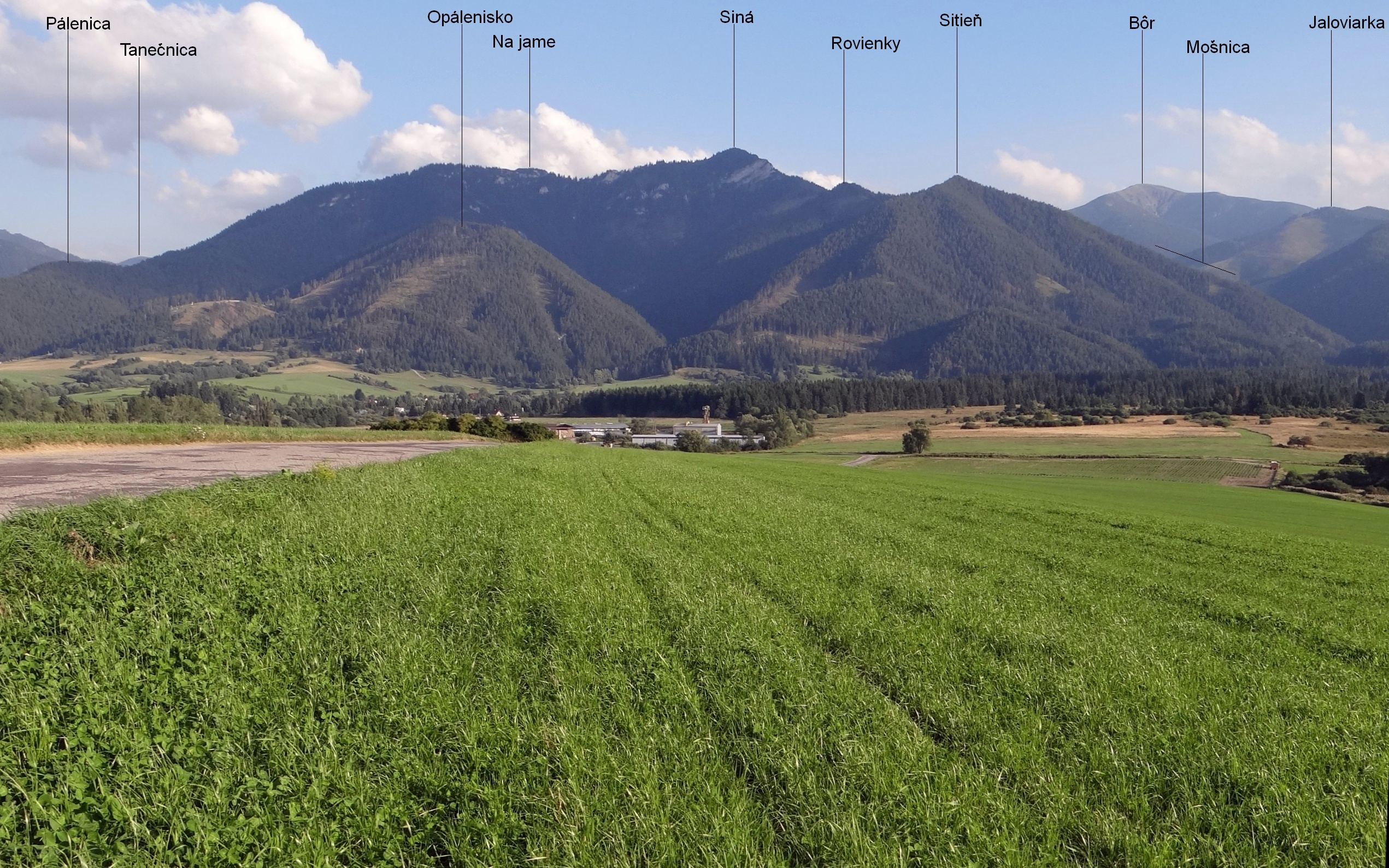 Panorama widokowa ze wzgórza przy wsi Svätý Kríž